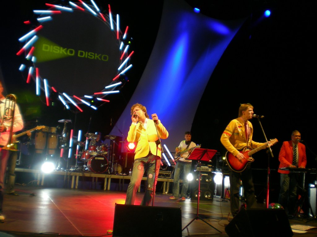 Labvēlīgais tips at concert in Arena Riga